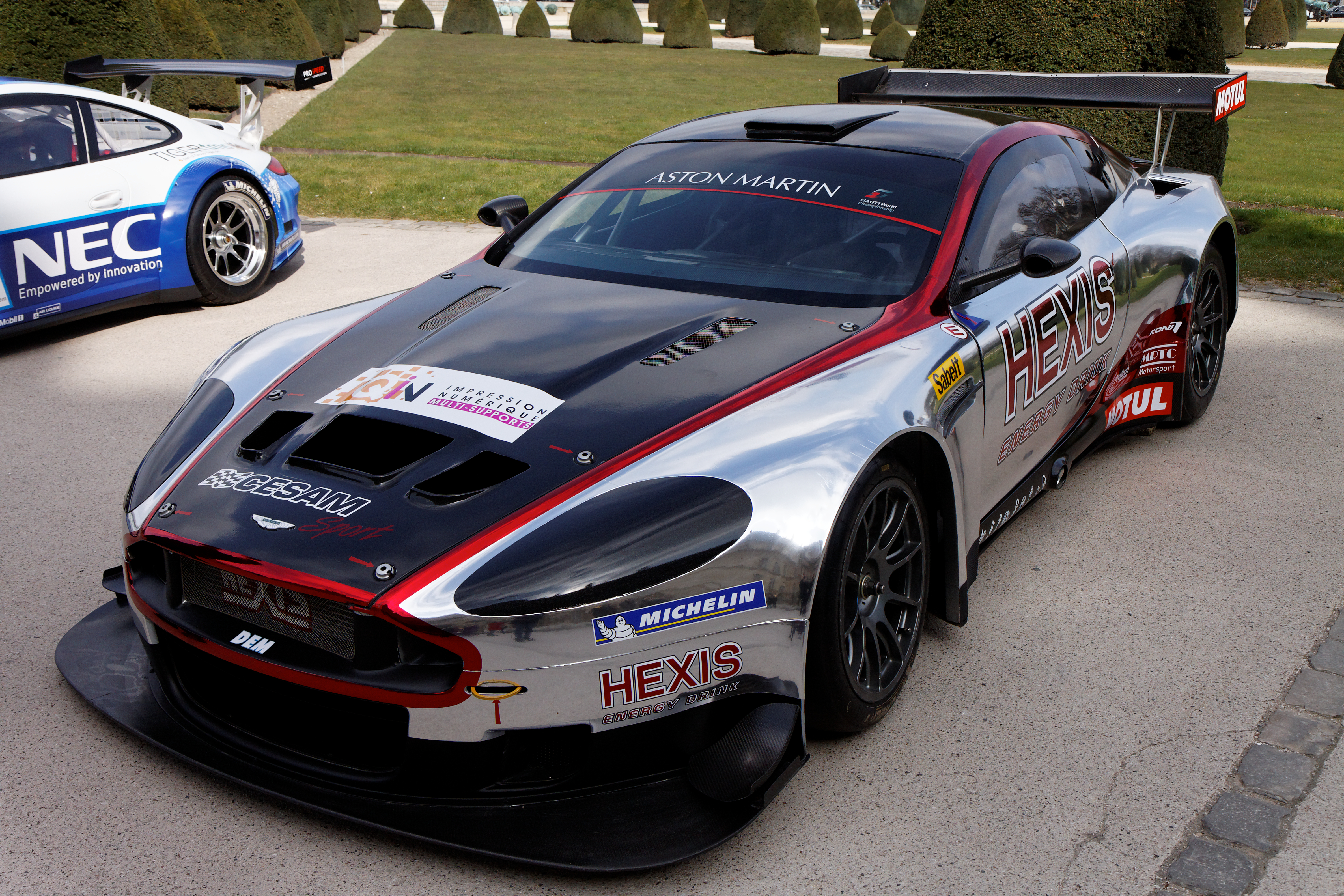 Photographie prise lors de la présentation du Blancpain Endurance series aux Invalides à Paris en mars 2011.